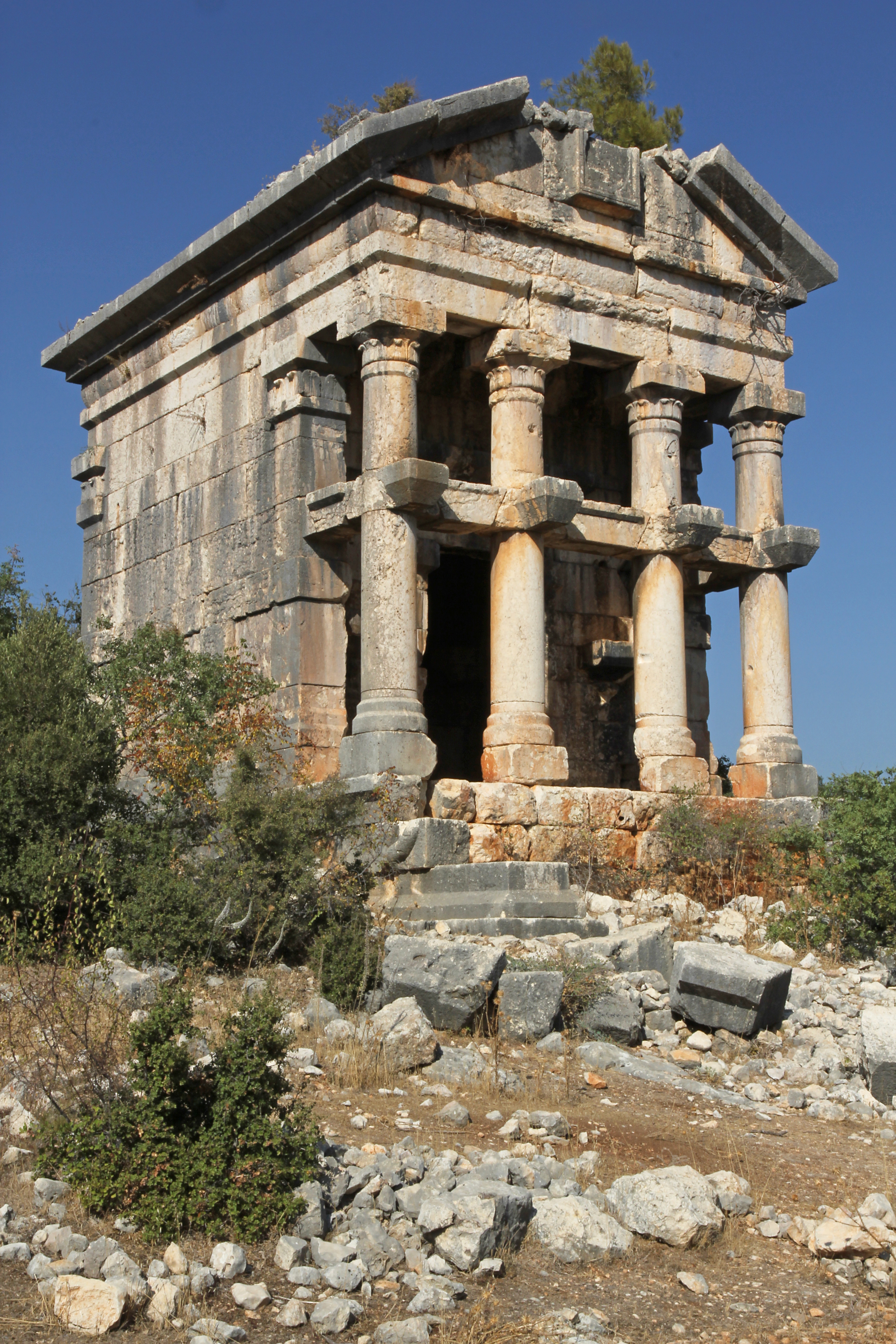 Mezgit Kalesi, spätrömischer Grabbau nahe Silifke, Südtürkei